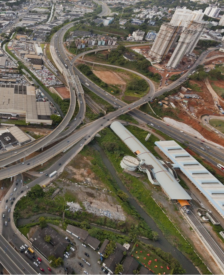 Vista aérea da Estação Acesso Norte, e parte do leito do Rio Camarajipe até quando a foz do Rio das Tripas, em Salvador.